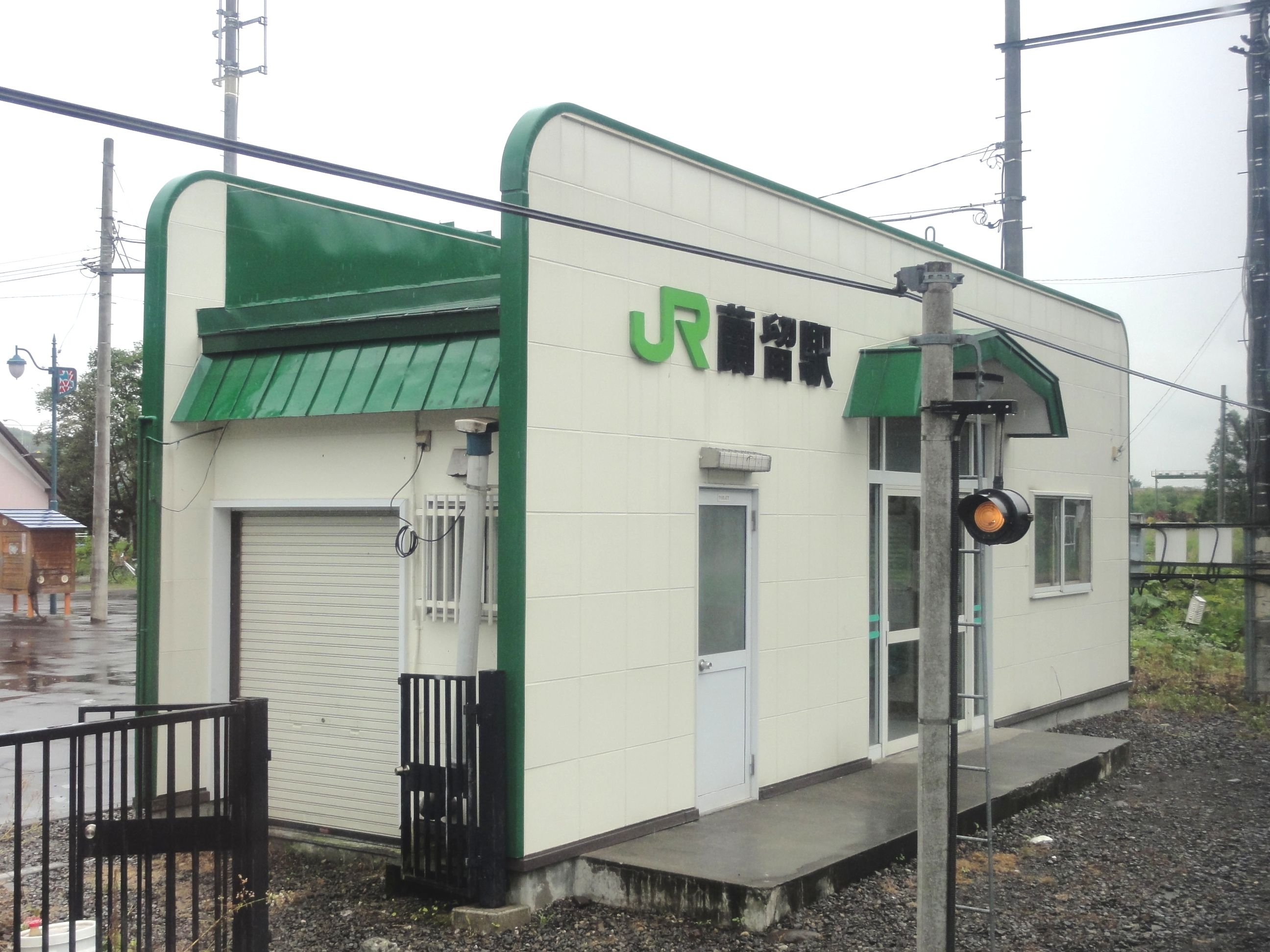 蘭留駅待合室